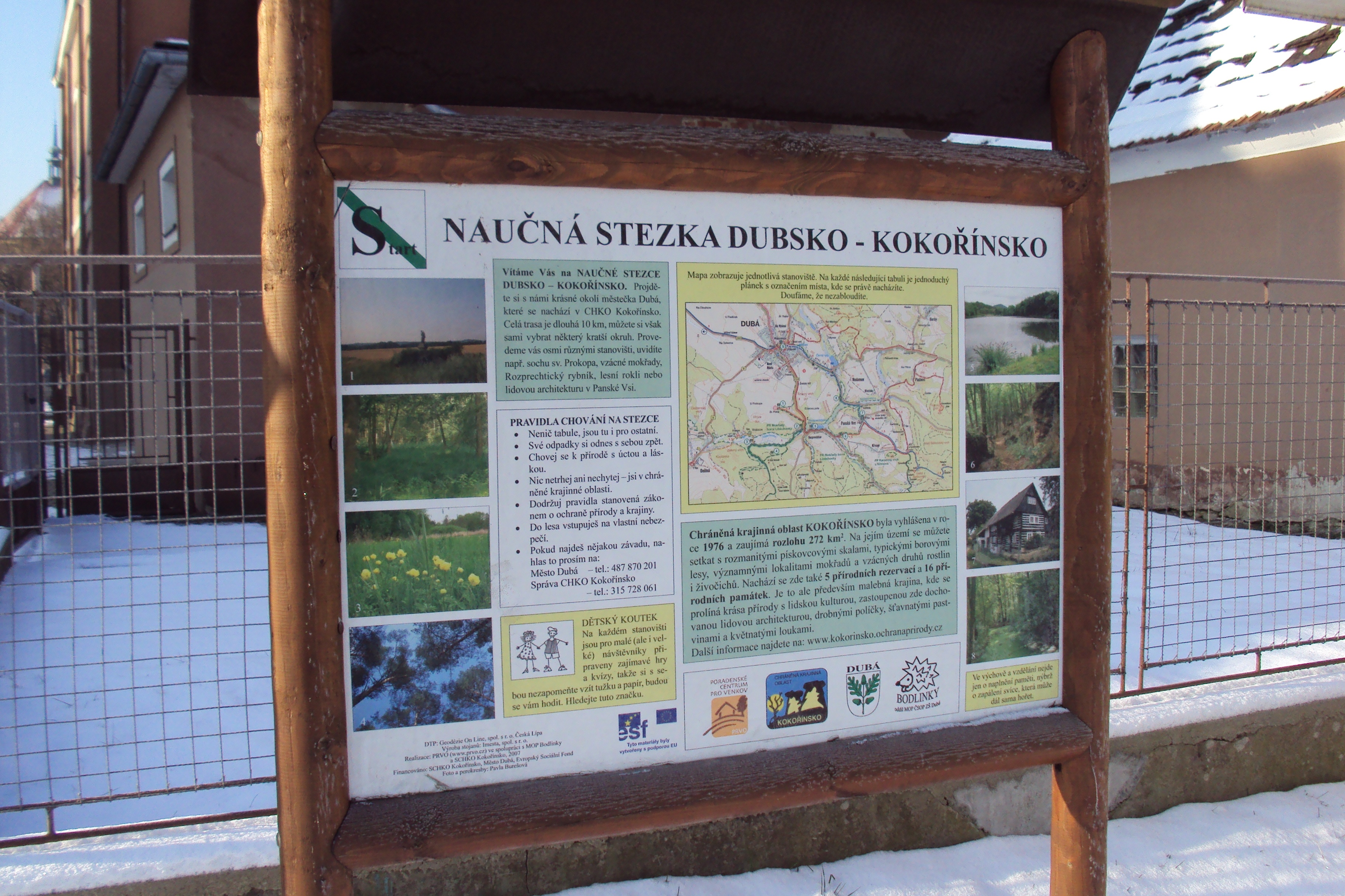 Tabule je u autobusového nádraží Dubá